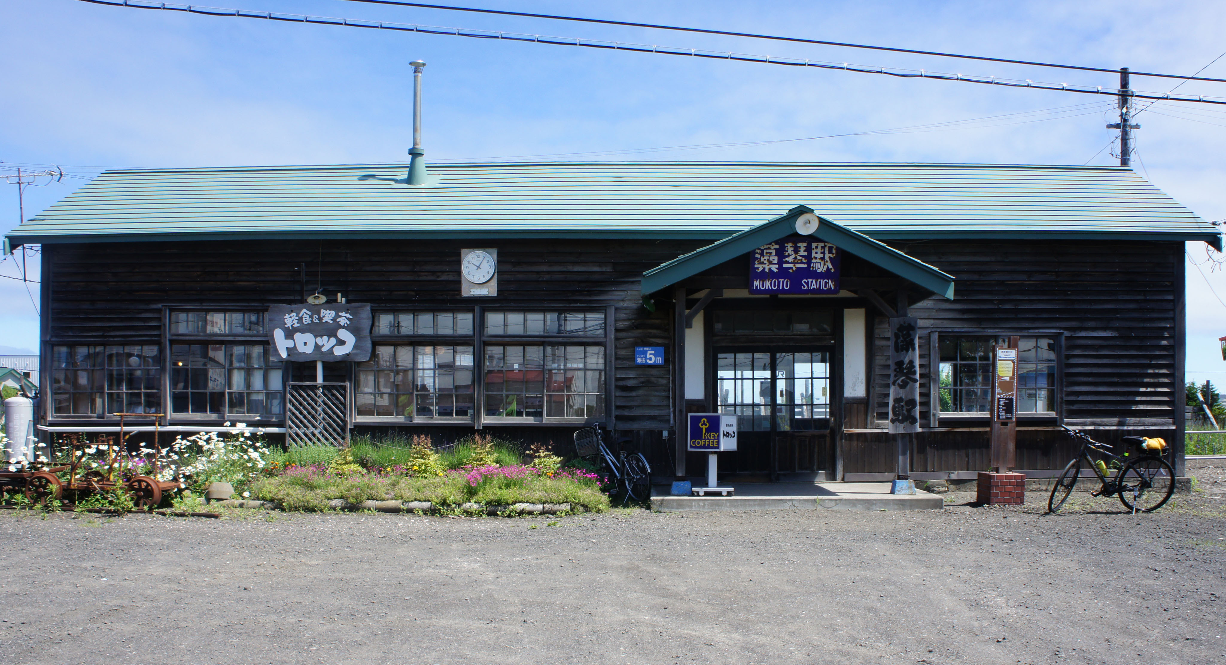 JR釧網本線・藻琴駅の駅舎